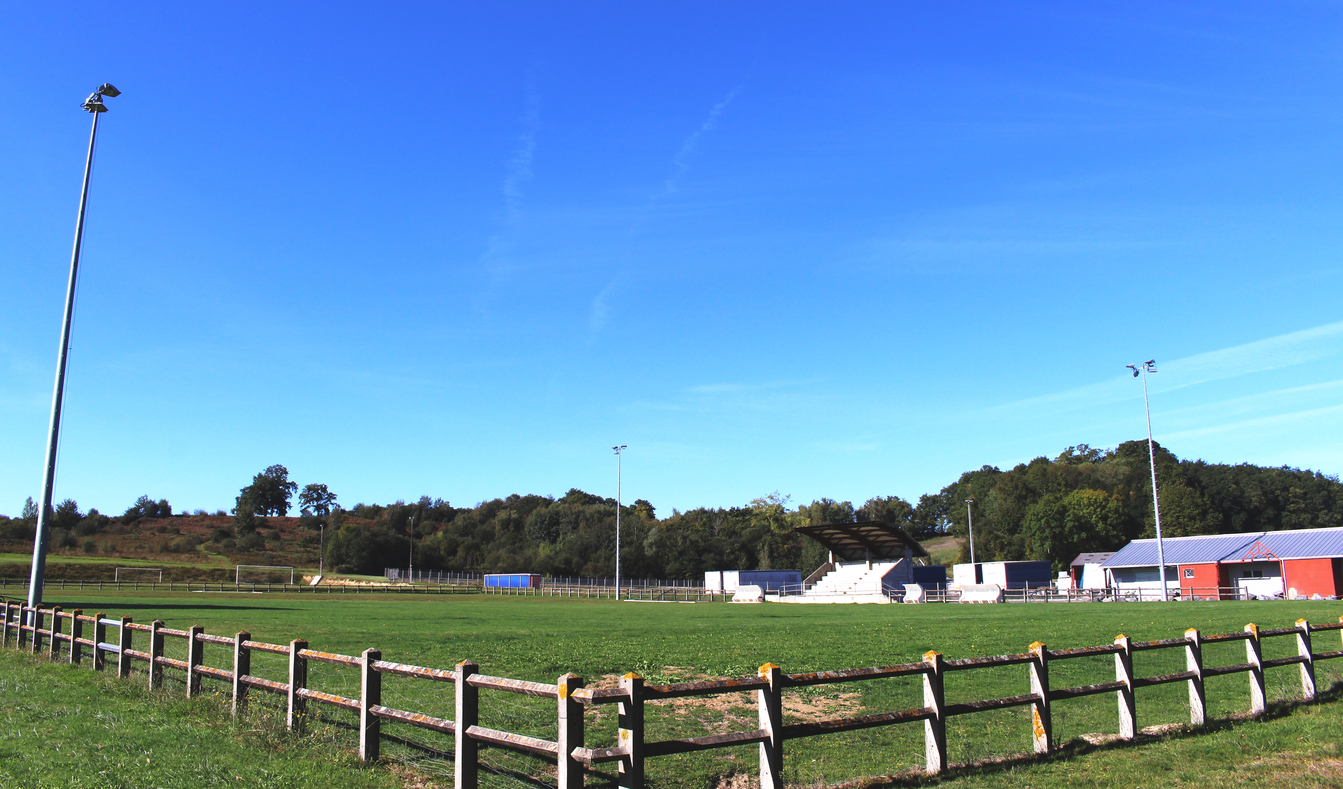 Stade de football de Lanne (Hautes-Pyrénées)